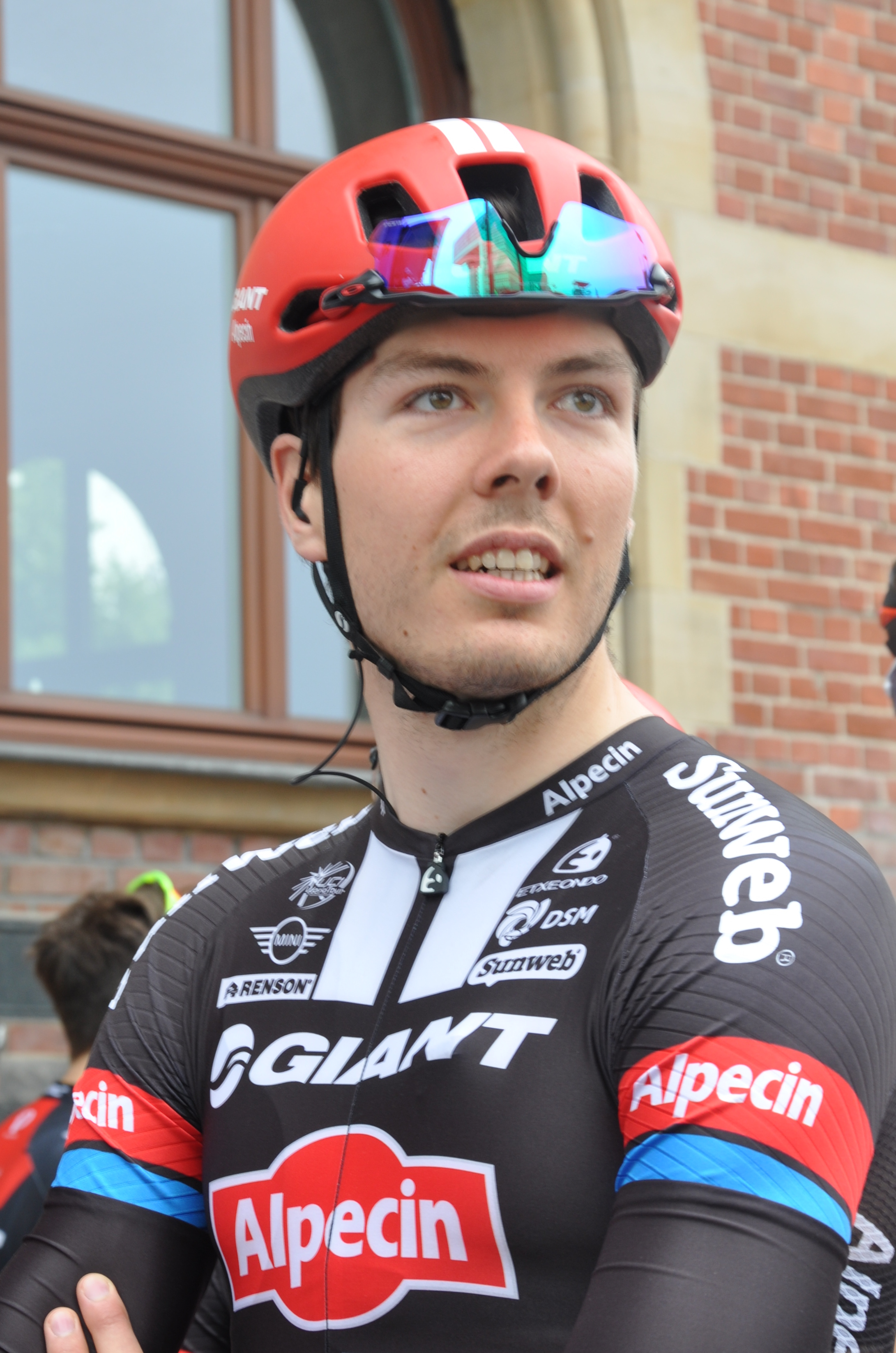 Max Walscheid, deutscher Radrennfahrer